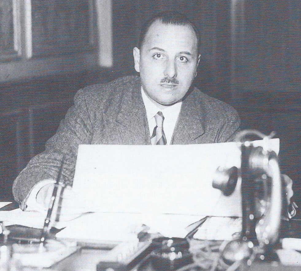 Photo de Gabriel Caullet, président de l'Olympique lillois jusqu'à sa mort en 1940 sur le champ de bataille.